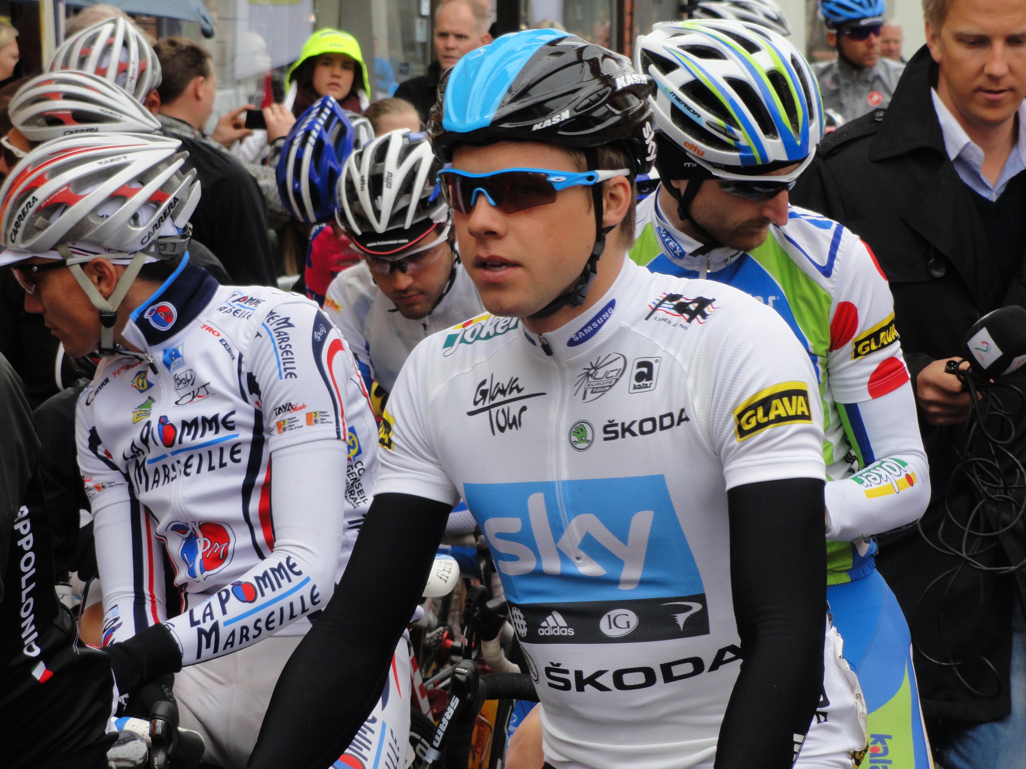 Vinner av Ungdomskonkurransen i ToN 2012